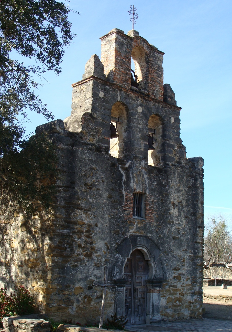 Mission Espada, San Antonio, Texas